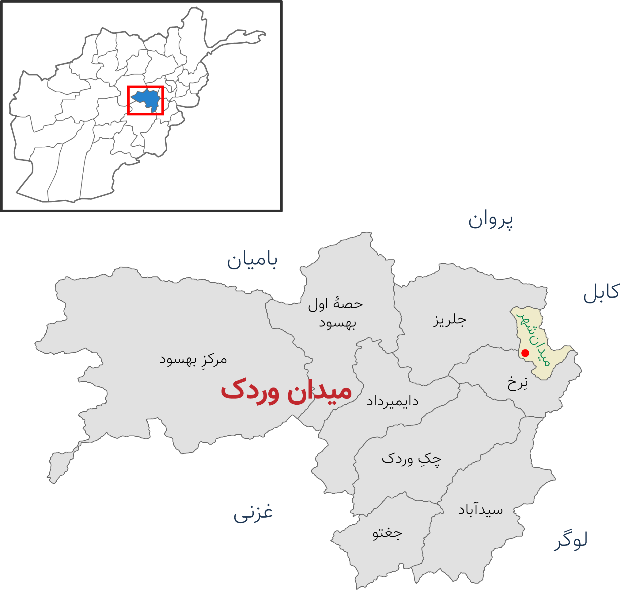 نقشه ولسوالی‌های ولایت میدان وردک و ولایات همسایه این ولایت و موقعیت آن در نقشه افغانستان